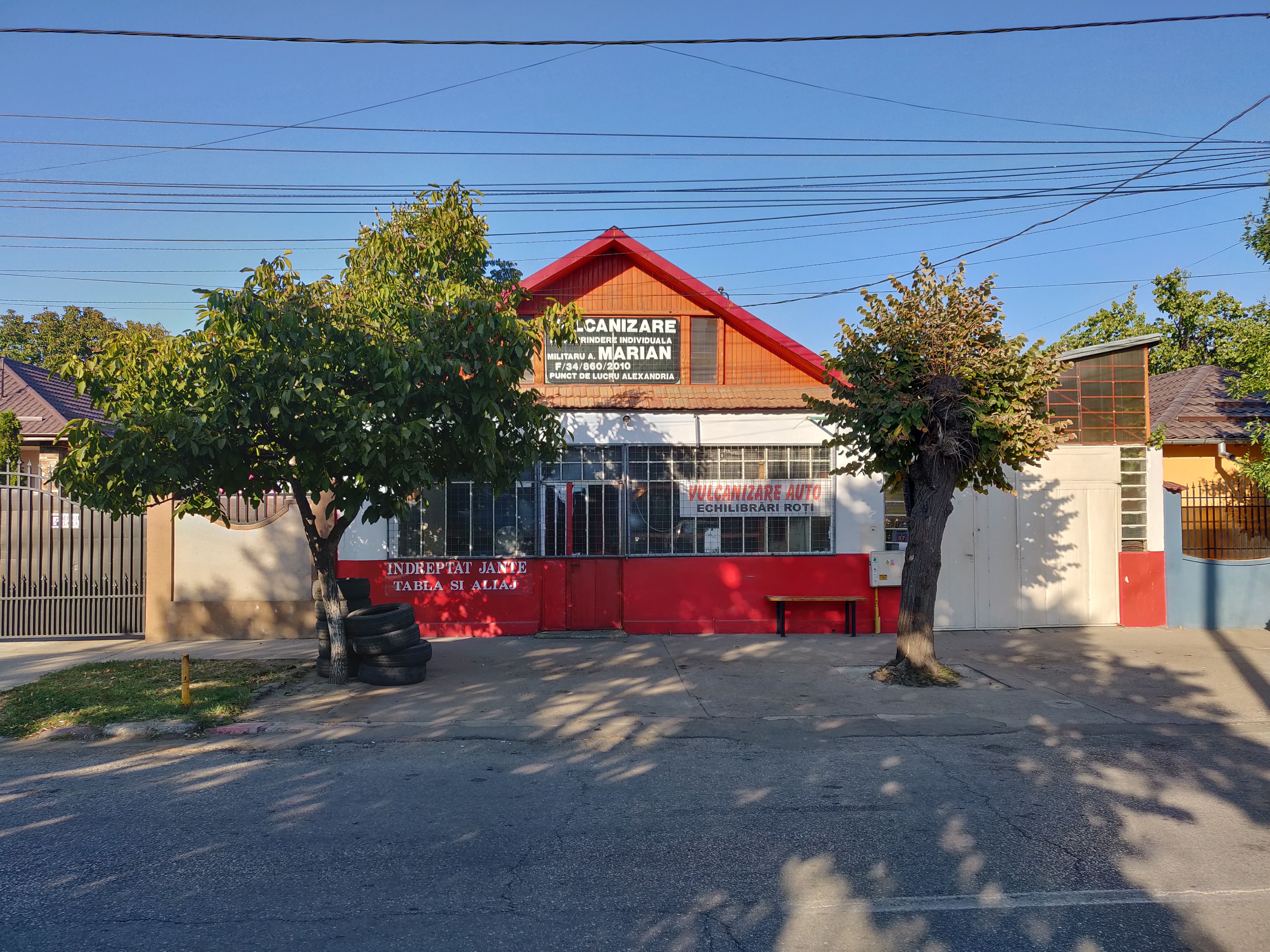 Casa Marin Năbărogu